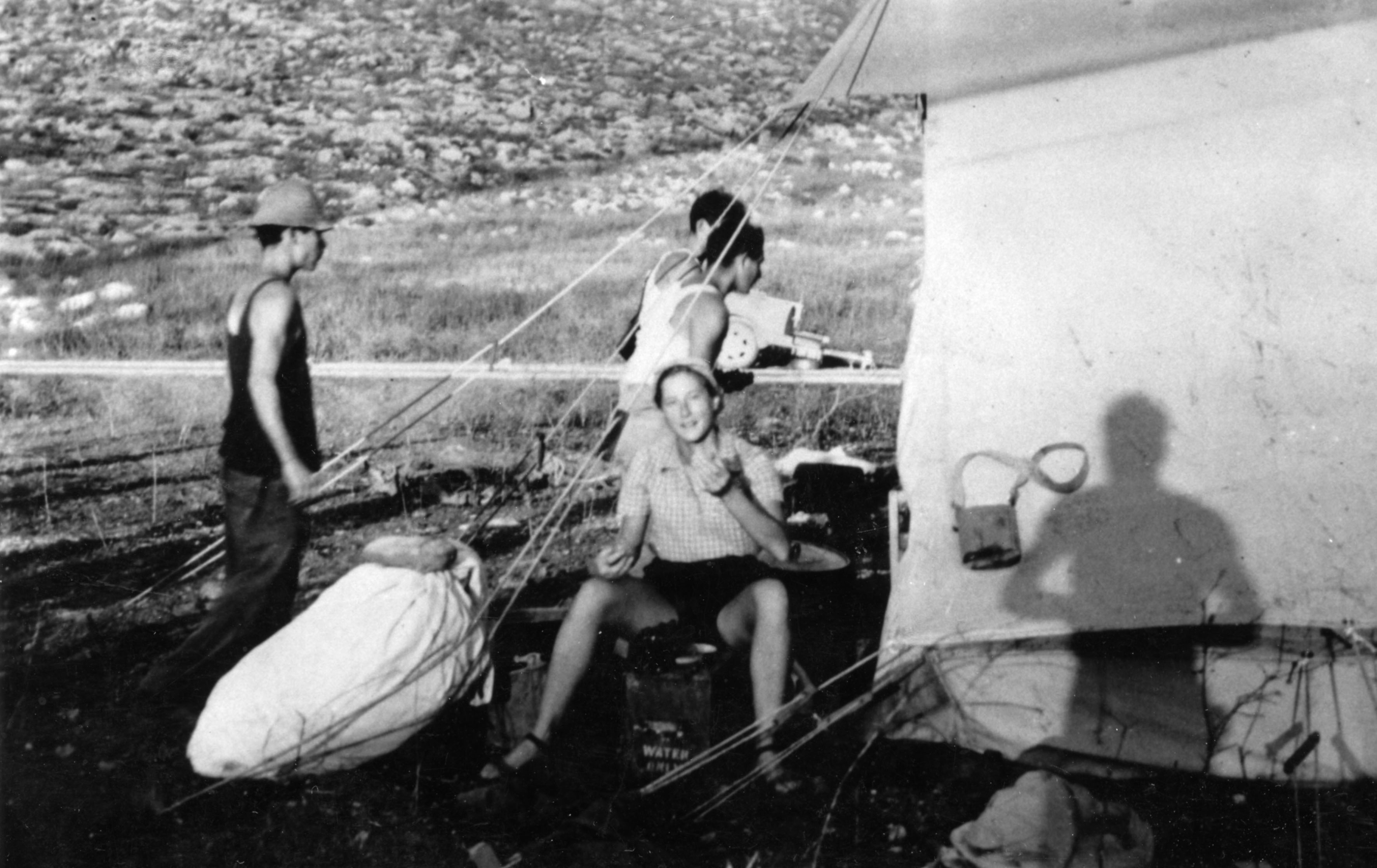 גילה בן עקיבא,התמונה צולמה אחרי ההפוגה הראשונה - מפקדת המחלקה במשלט 9 רכס חתולה מול בית נובא. גילה בן עקיבא.